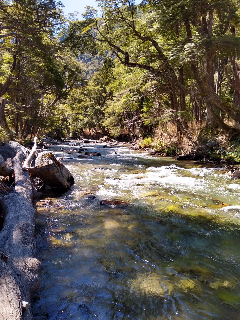 Este es un arroyo que esta situado camino a los 7 Lagos de la Ciudad de Villa la Angostura.